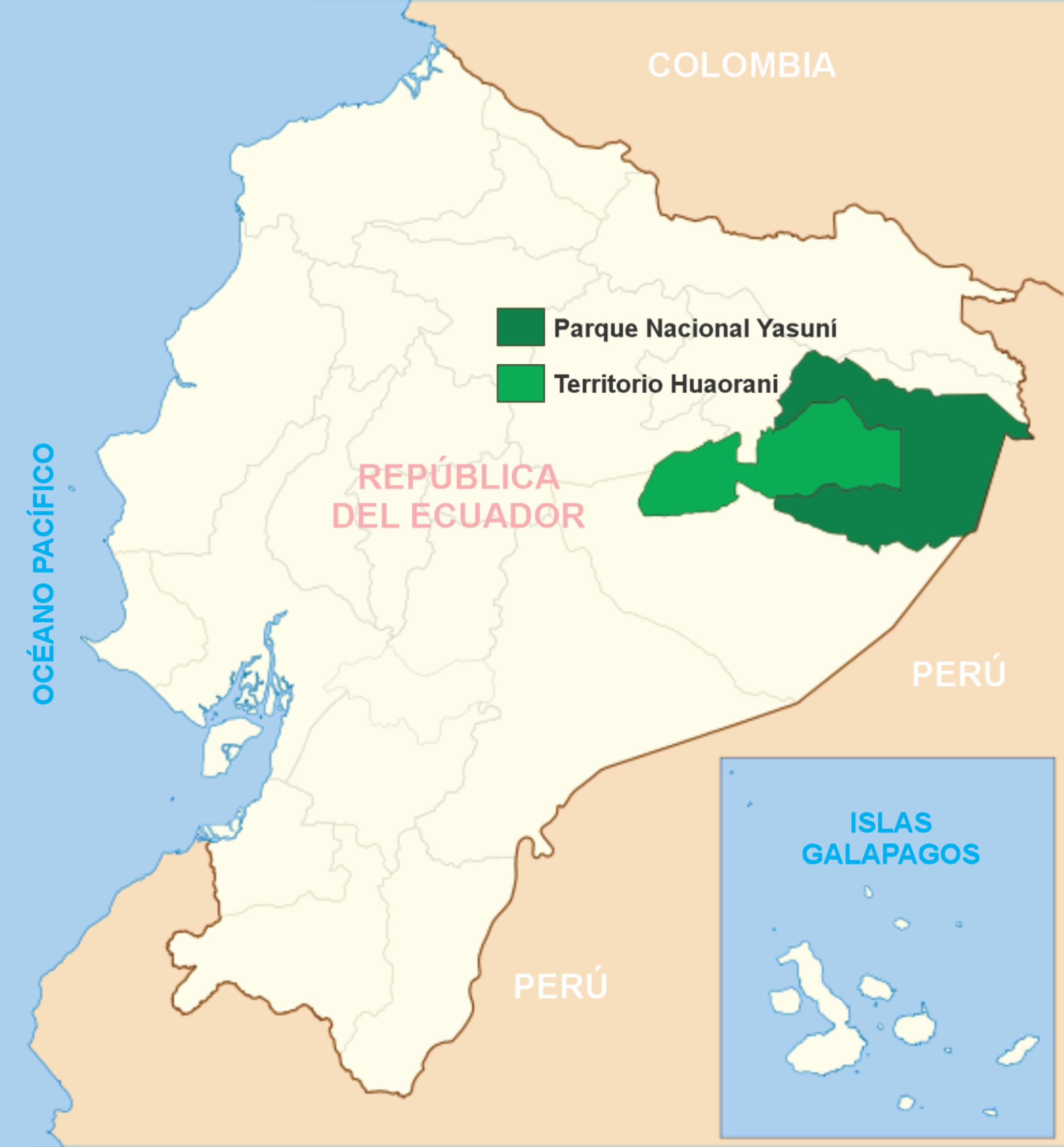 Localización del Parque Yasuni